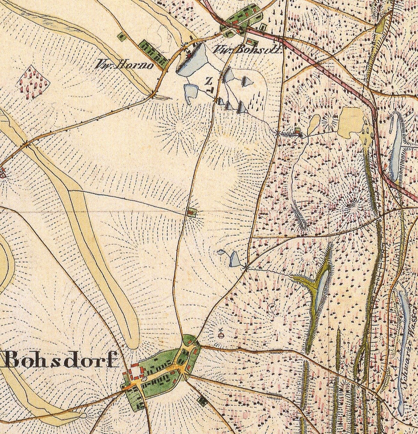 Bohsdorf, Gemeinde Felixsee, Landkreis Spree-Neiße, Brandenburg, Ausschnitt aus dem Urmesstischblatt 4353 Döbern von 1845